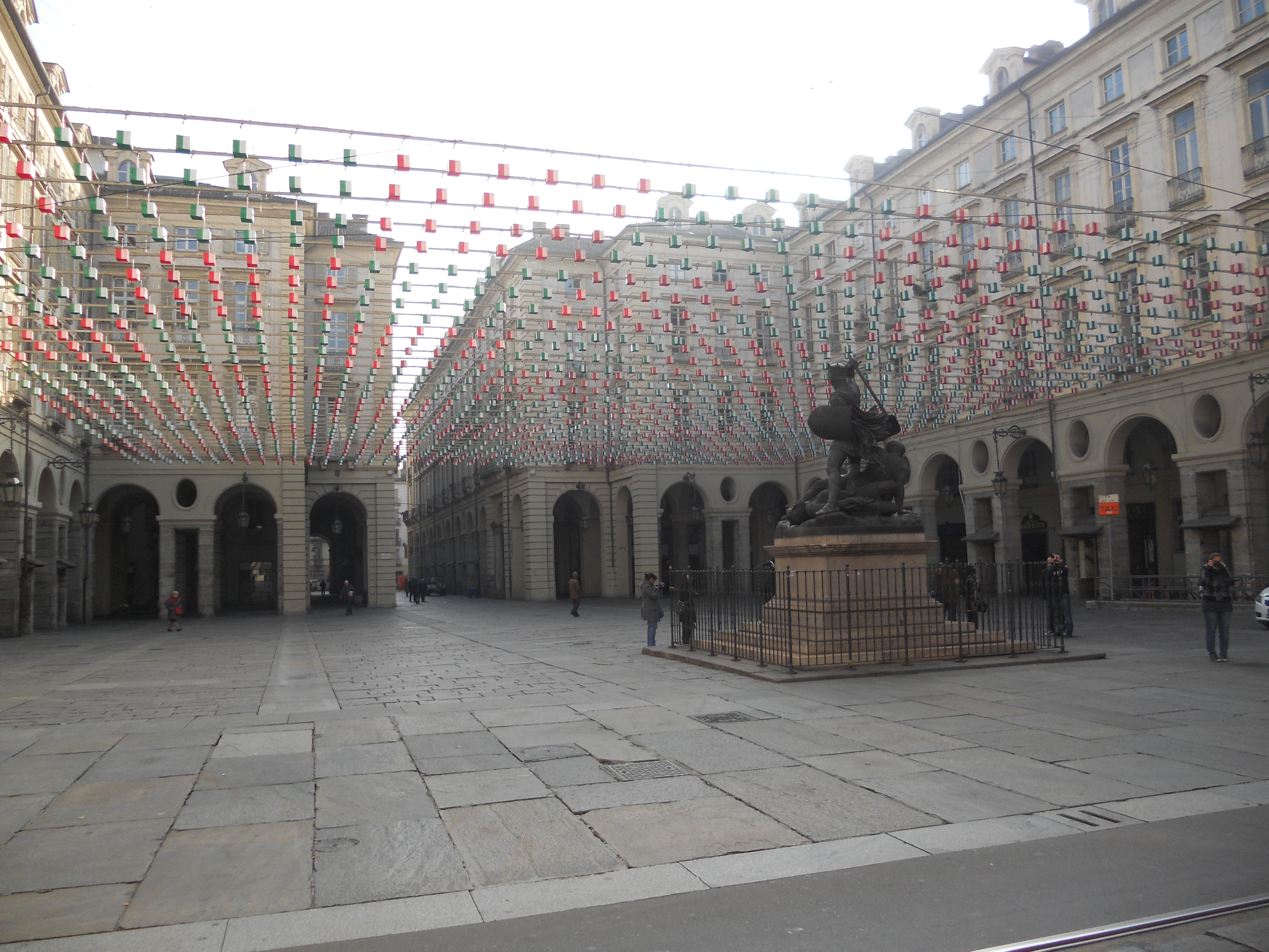 Festeggiamenti dei 150 anni dell'unità d' Italia a Torino: Piazza Palazzo di Città